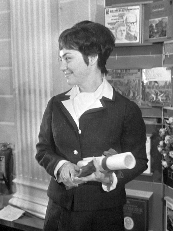 Klassieke Edisons 1969 worden uitgereikt in het Concertgebouw Amsterdam 1969. Edith Mathis (sopraan).